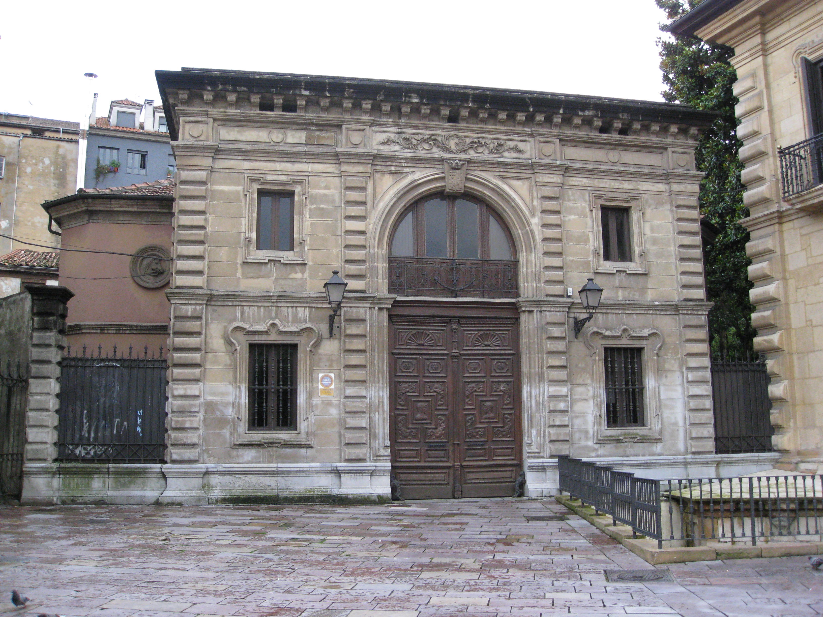 Caballerizas del palacio del Marqués de San Feliz (edificio)